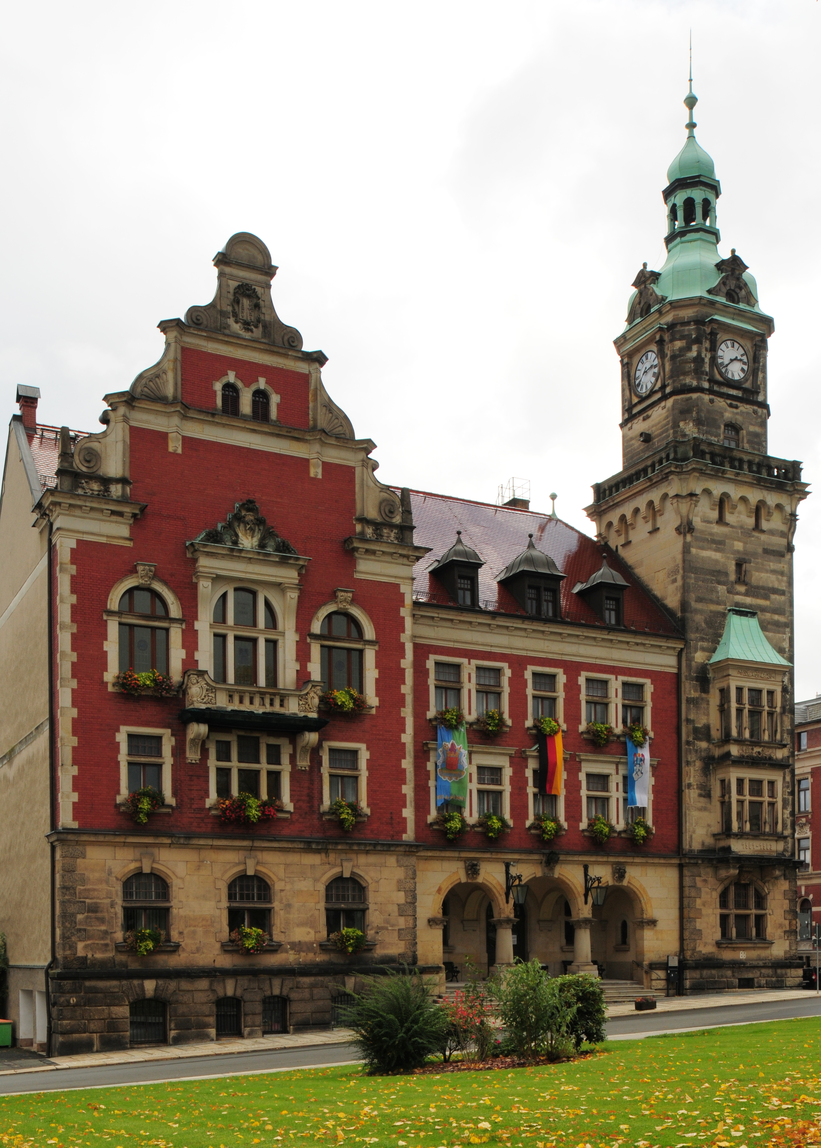 Falkenstein / Vogtl., Rathaus (Vogtlandkreis, Sachsen, Deutschland)